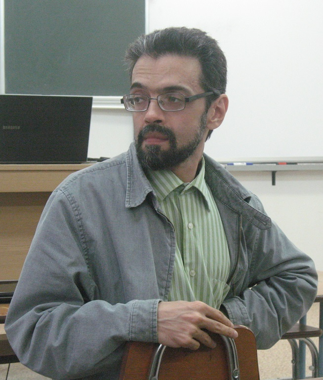 Евгений Абдуллаев